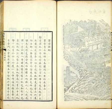 清道光年版 鴻雪因緣圖記